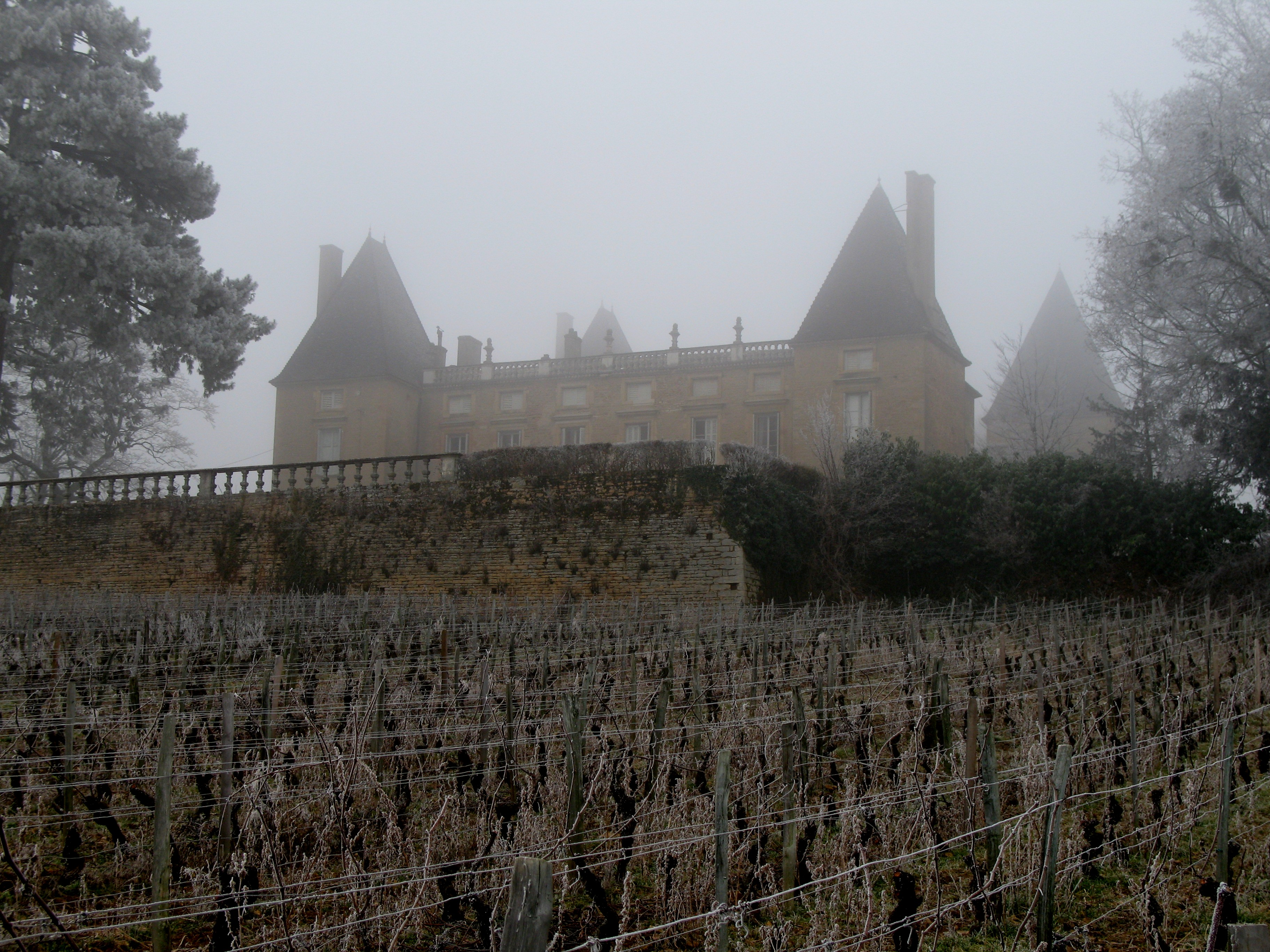 château de Layé - Vinzelles (Saône-et-Loire)